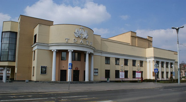 Брестский академический театр драмы Беларуская (тарашкевіца): Брэсцкі акадэмічны тэатр драмы